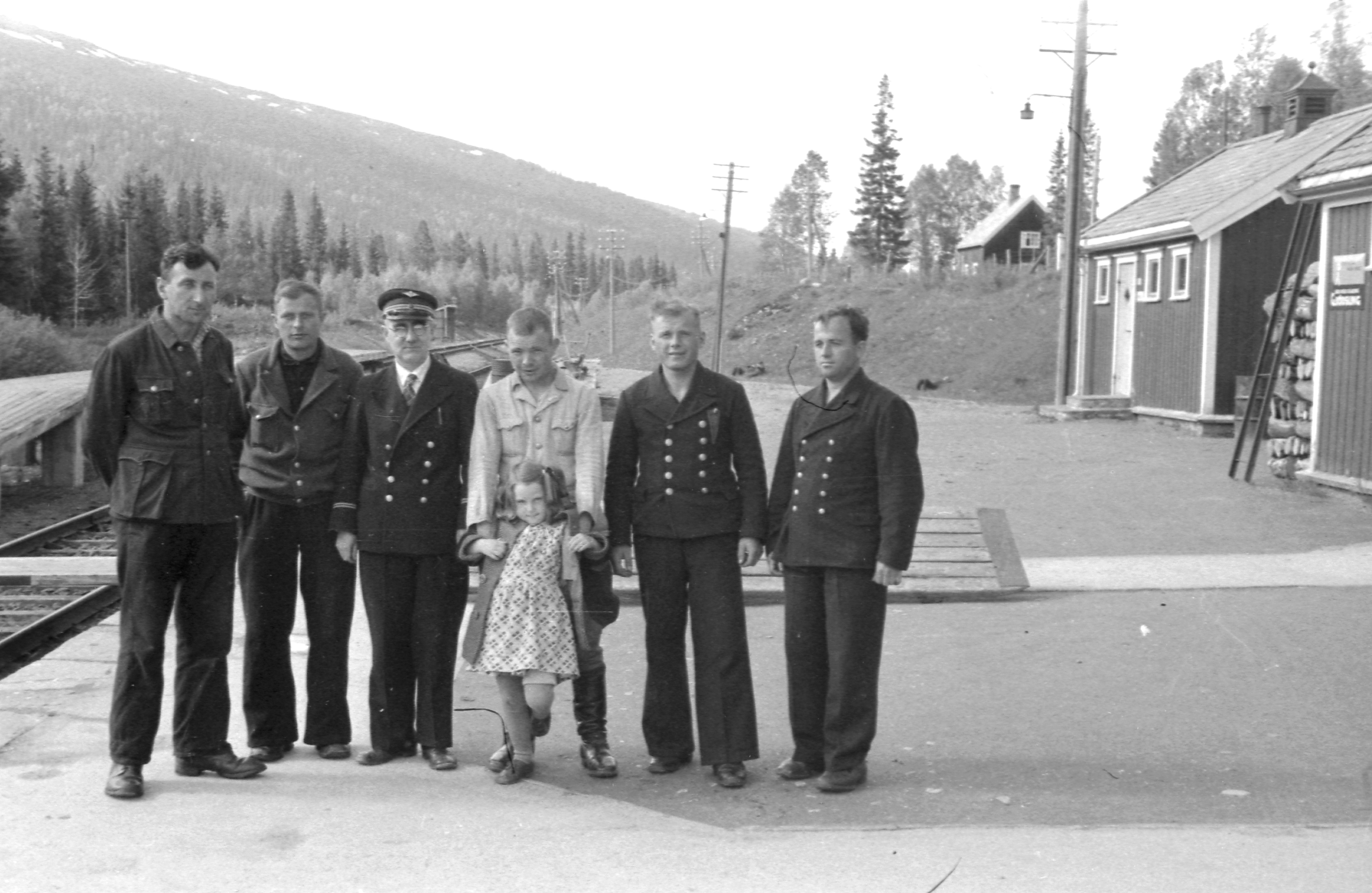 Formofoss stasjon på Nordlandsbanen, 17. mai 1945. Foto: Kåre A. Jørgenvaag/NTNU UB.